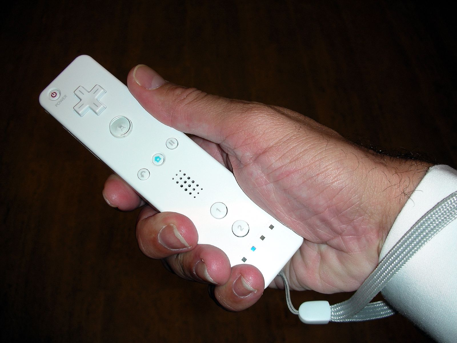 Vista del mando en la mano